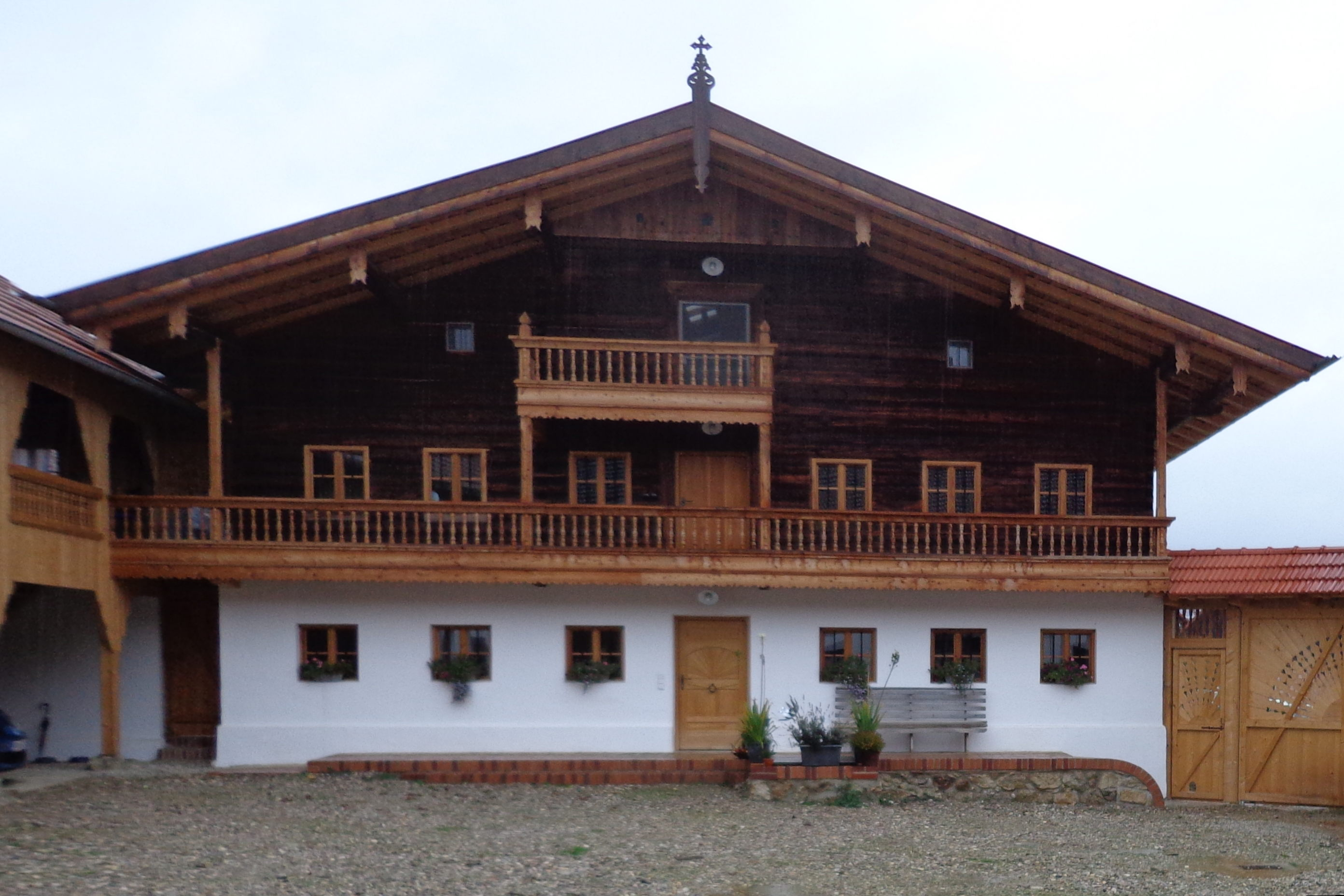 Sogenannter Moserhof, mit Blockbau-Obergeschoss, Dieses Wohnhaus hat einen Giebelschrot und ein flach geneigtes Satteldach, an der Firstpfette ist es bezeichnet mit „1834“